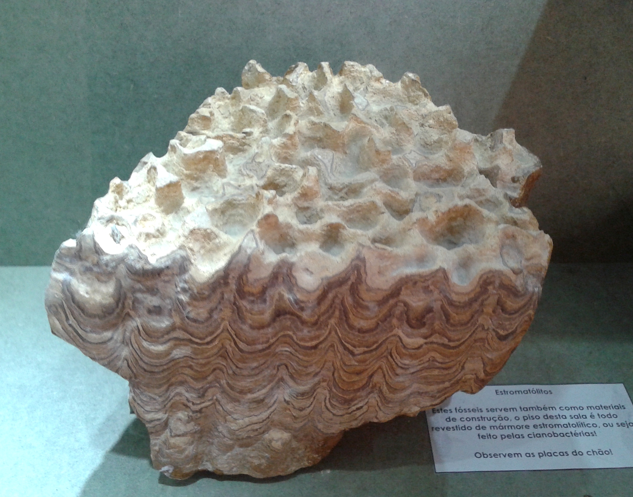 Estromatólito. Acervo do Museu Nacional/UFRJ, Rio de Janeiro, Brasil.